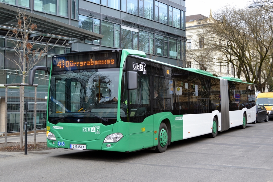 Linie 41 Sonnenfelsplatz.